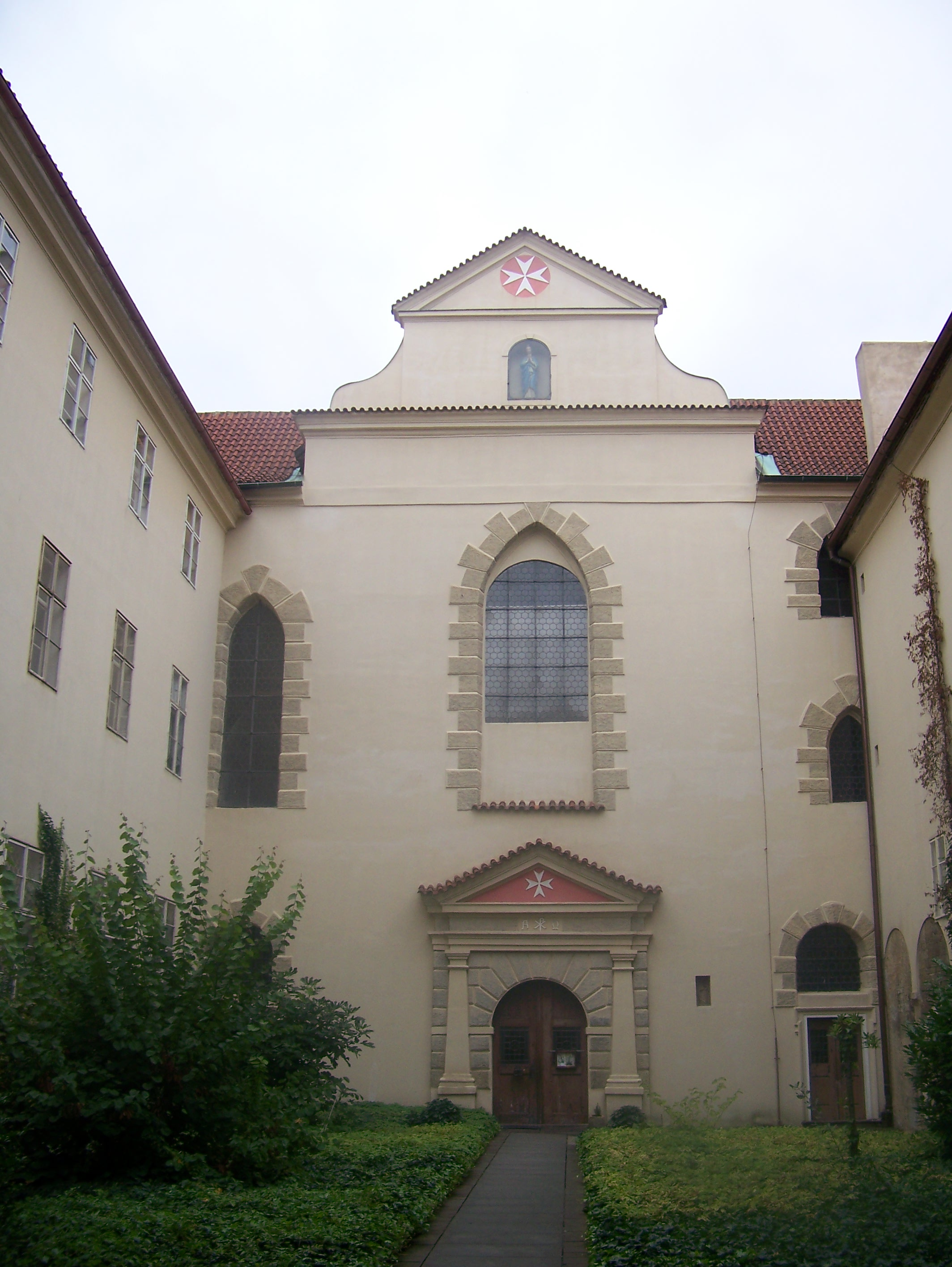 Kościół Marii Panny Pod Łańcuchem, Praga